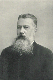 Georg Bühler (1837-1898), eminent German Sanskrit scholar.